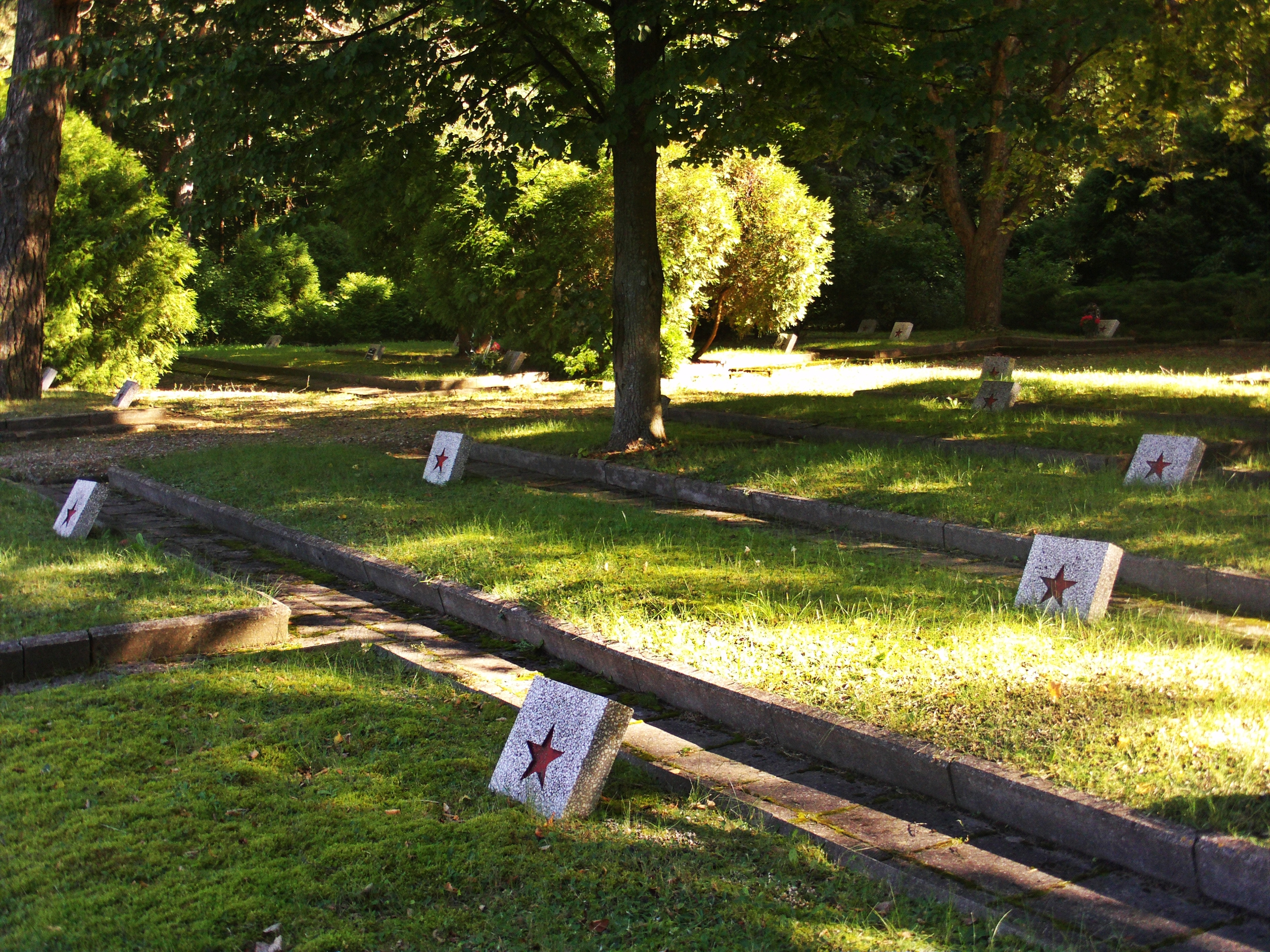 Suwałki - Cmentarz Żołnierzy Radzieckich w Suwałkach. Kwatery anonimowych jeńców. (zabytek nr A-832 z 26.08.1991)